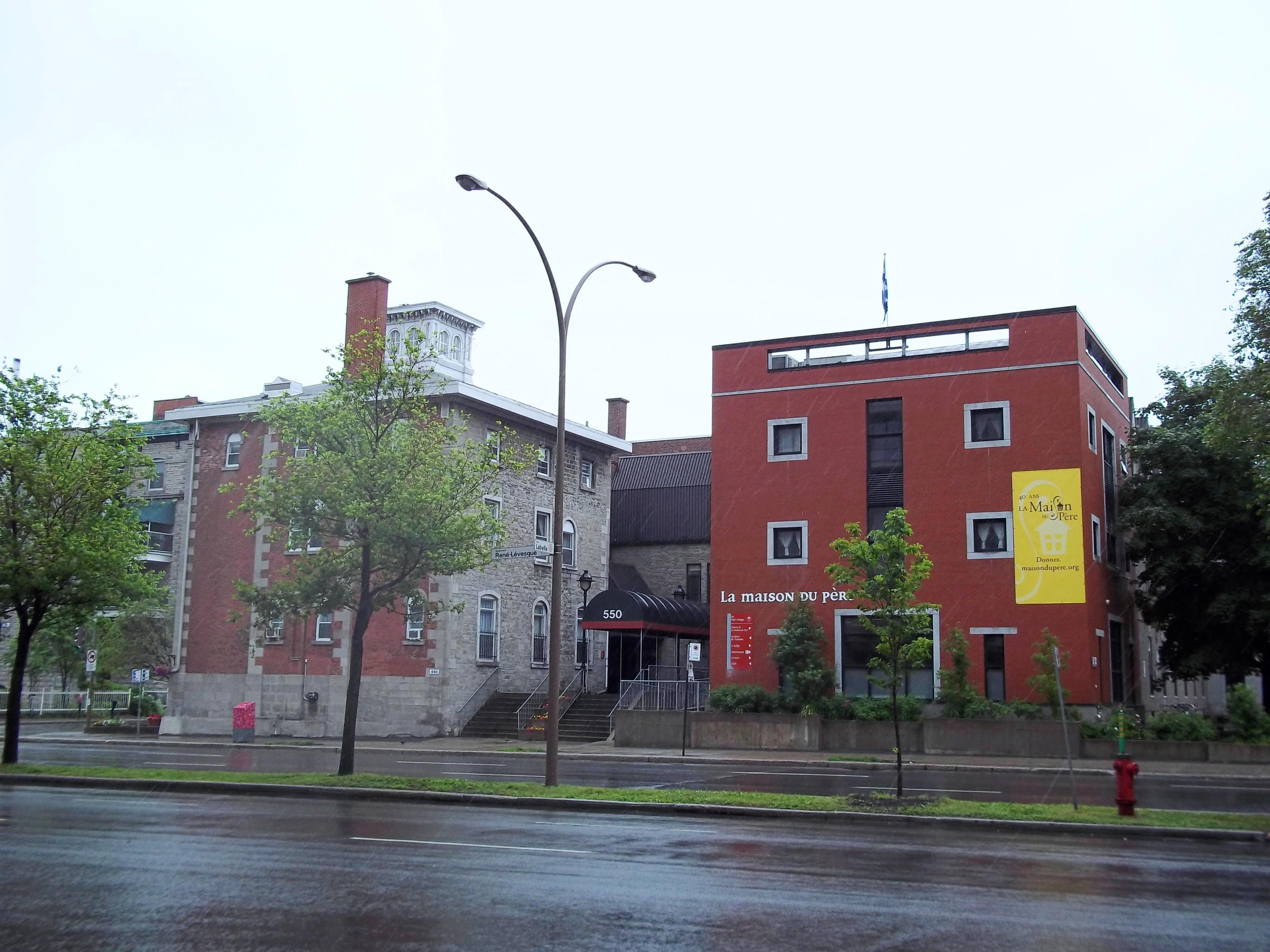 La Maison du Père, 550, boulevard René-Lévesque Est, Montréal.